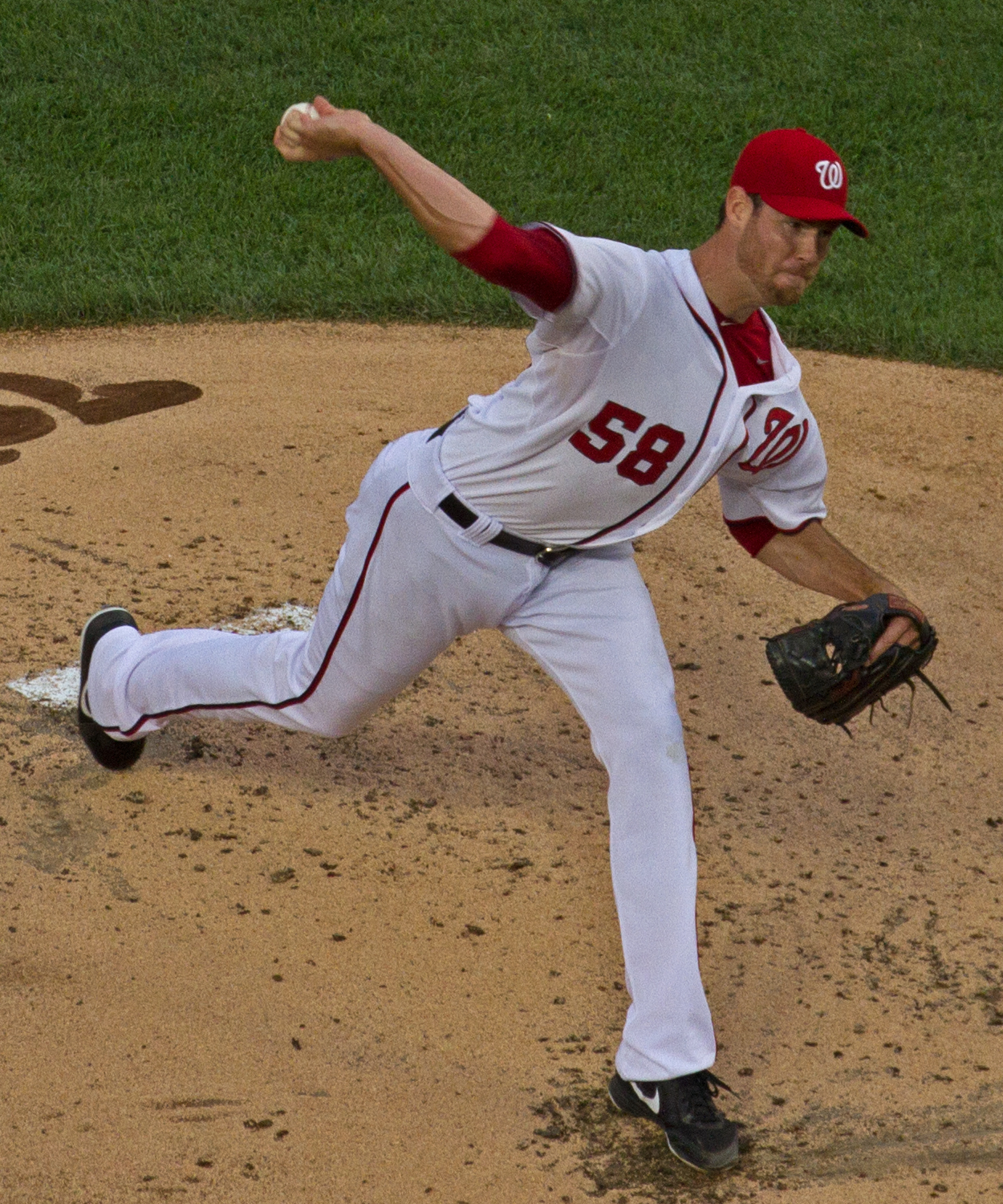 Doug Fister